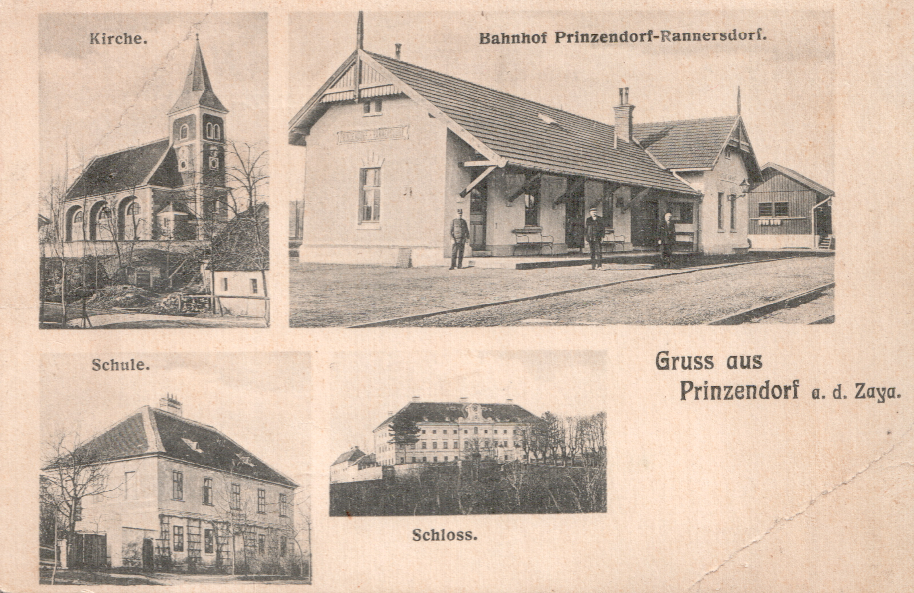 Alte Ansicht von Prinzendorf an der Zaya mit dem Bahnhof Prinzendorf-Rannersdorf